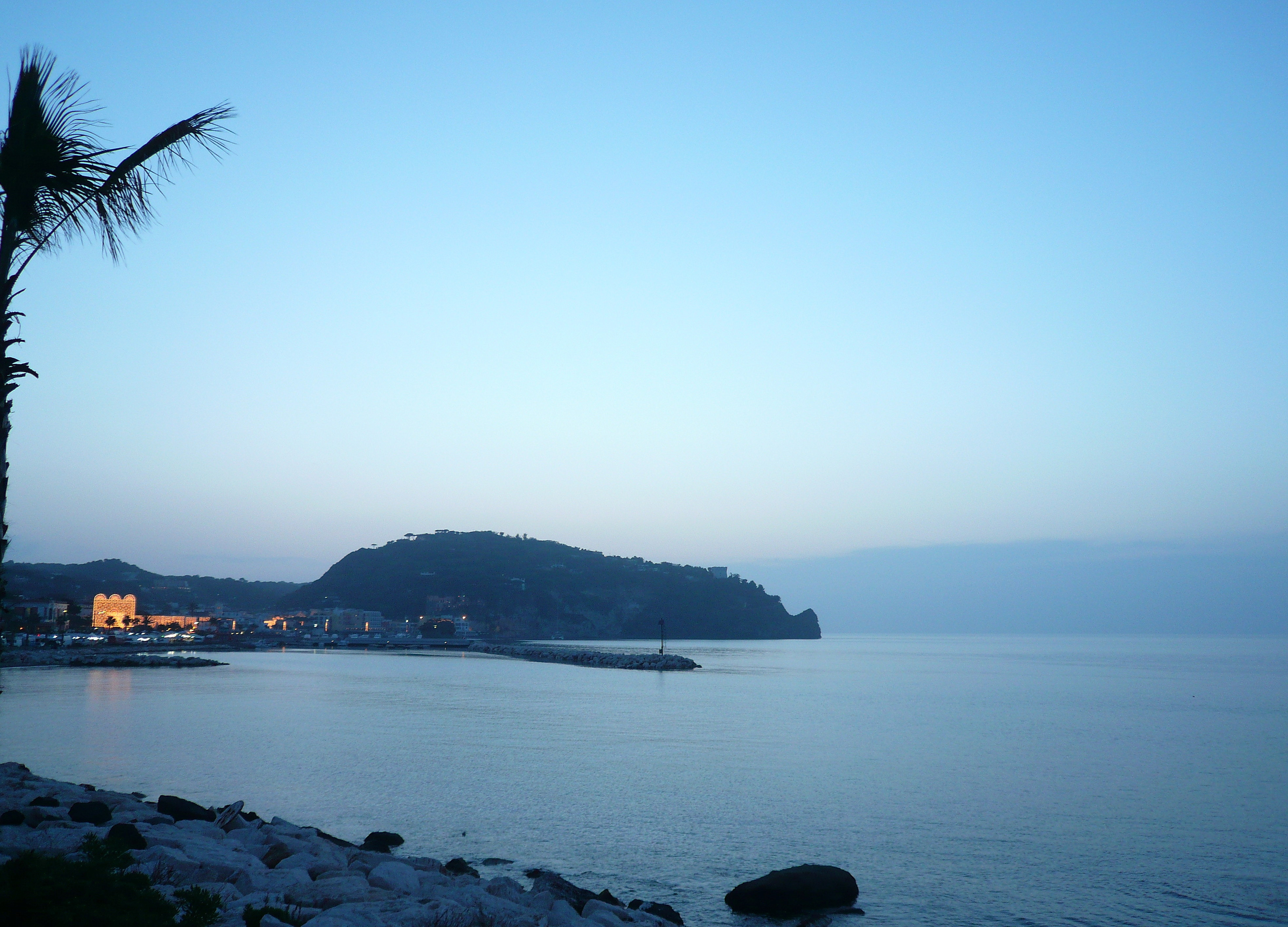 Monte Vico nel comune di Lacco Ameno (isola d'Ischia). Autore foto: Roberto De Martino